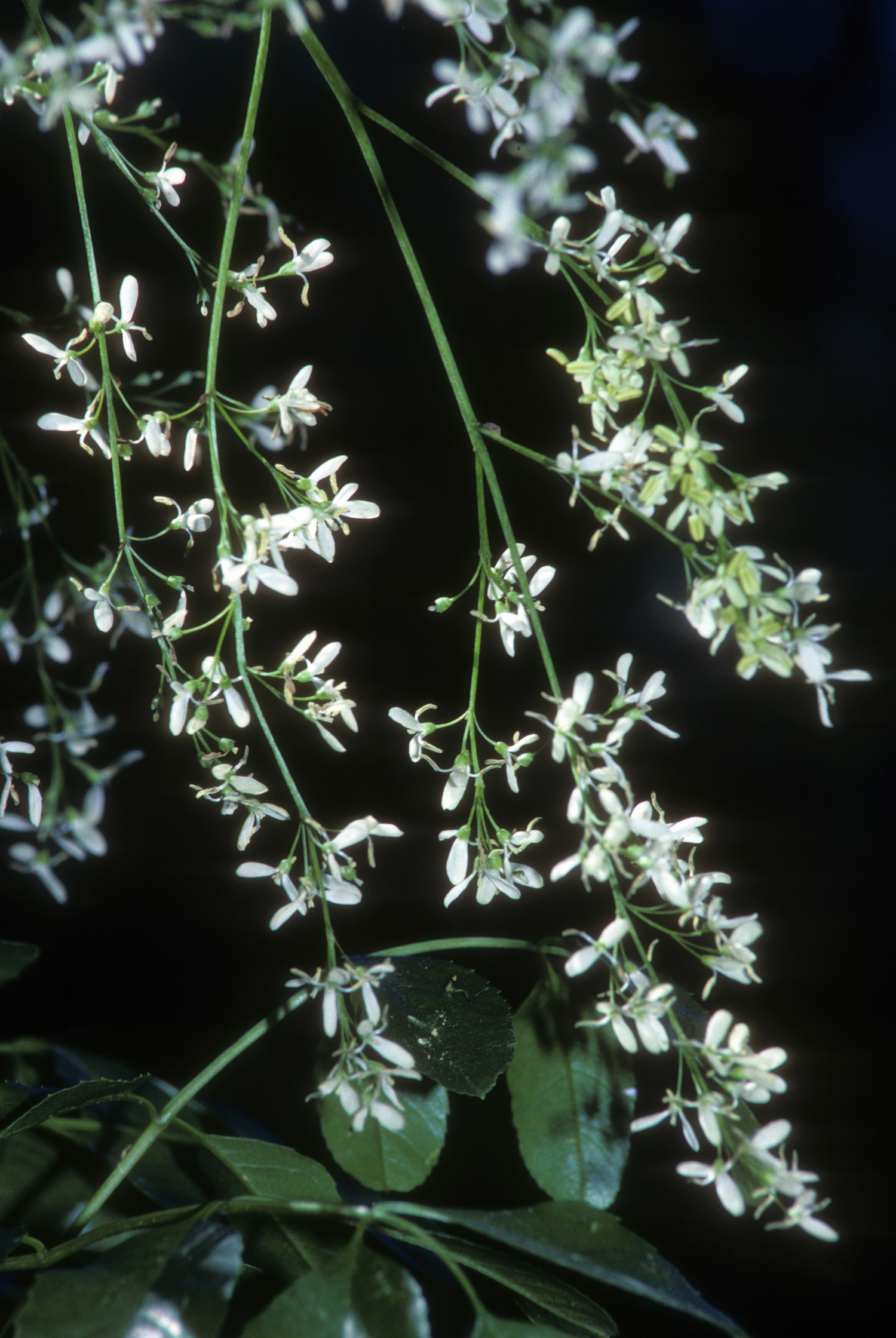 Fraxinus dipetala Rancho Santa Ana Botanic Garden, Claremont, California, Mar 1987.